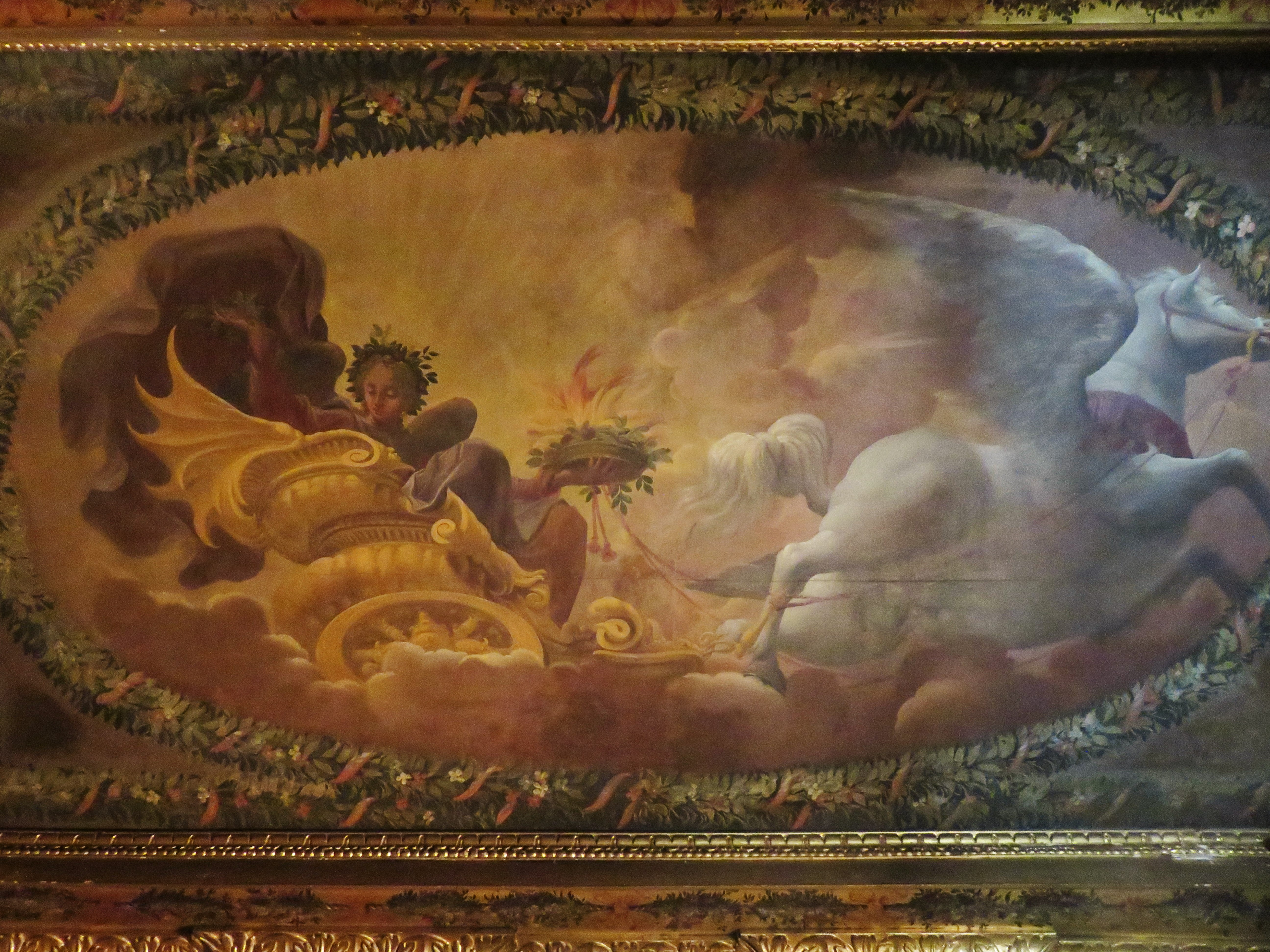 Camerino pensato probabilmente per Eleonora e Lucrezia, figlie del duca Ercole II d'Este, opera di Camillo Filippi e dei figli Cesare e Sebastiano. Interno. Pannelli lignei dipinti.